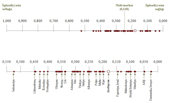 Məşğulluğun tənzimlənməsi sub-indeksi üzrə iqtisadiyyatın solluğu-sağlığı (2015)